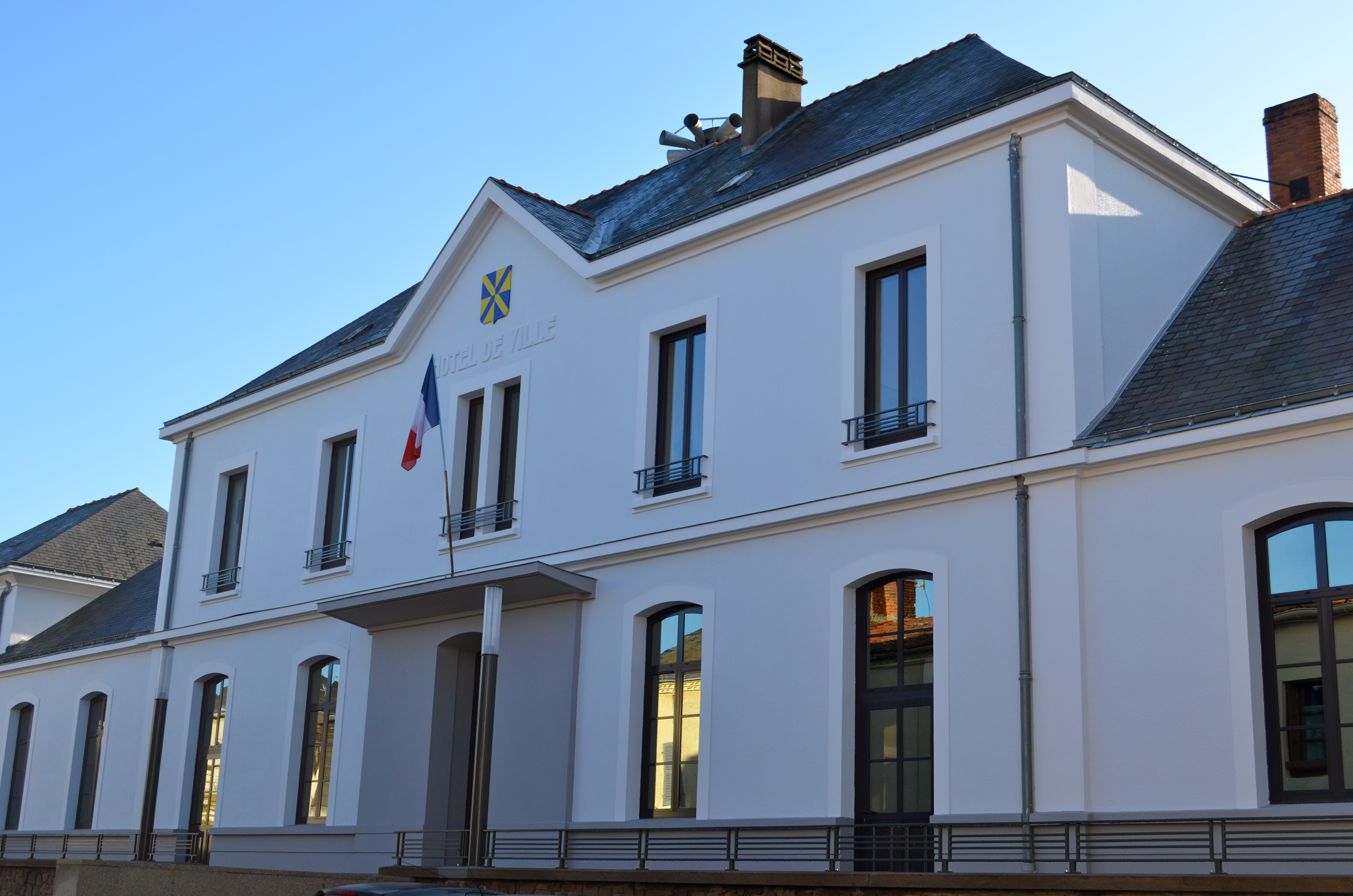 Hôtel de ville - Beaupréau (Maine-et-Loire, France).